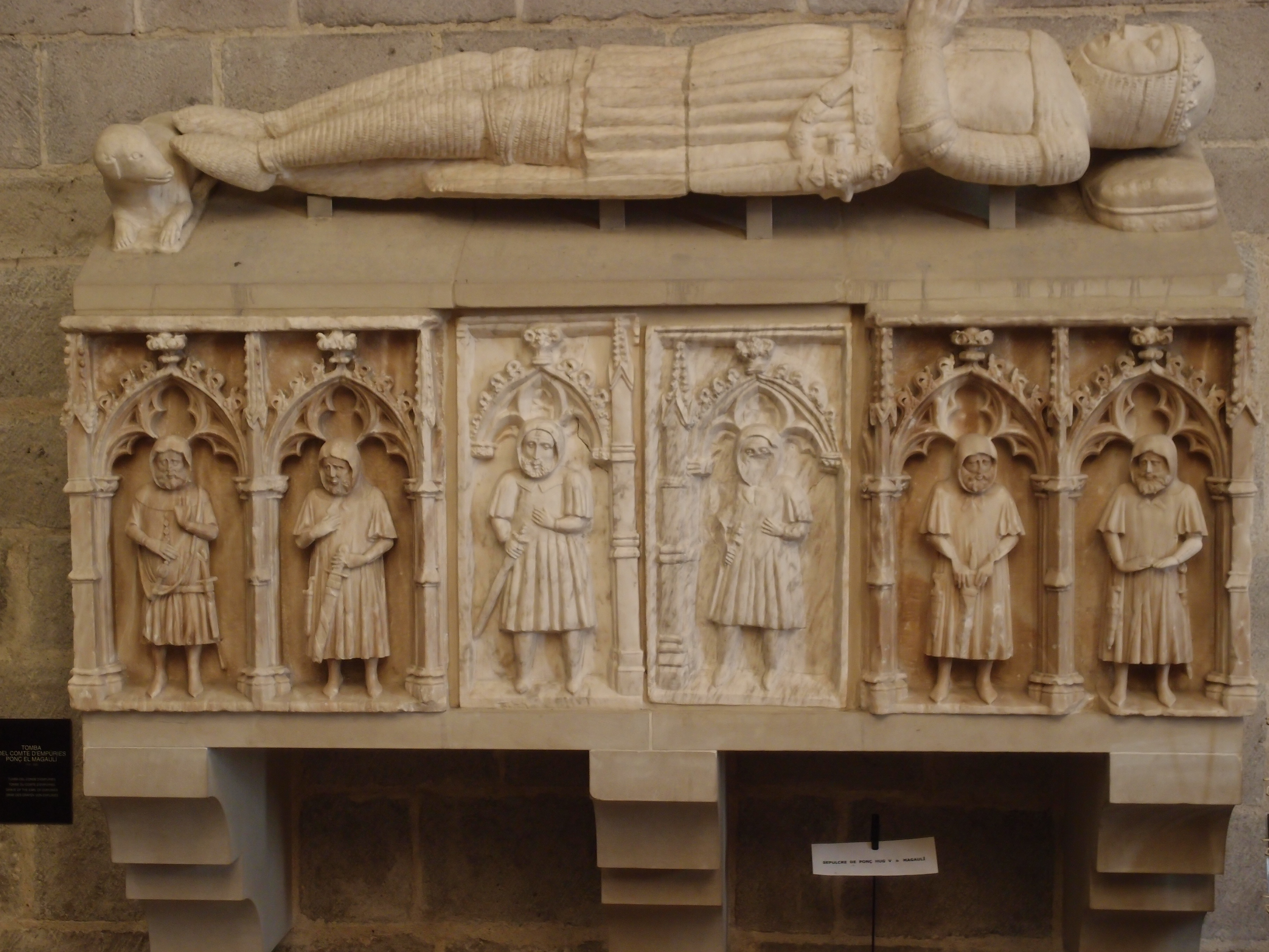 Basílica de Santa María (Castelló d’Empúries), gräfliches Grab - Katalonien/Spanien Datum: 29.09.2011 Urheber: M. Pfeiffer alias Gordito1869 Quelle: Privates Fotoarchiv des Urhebers